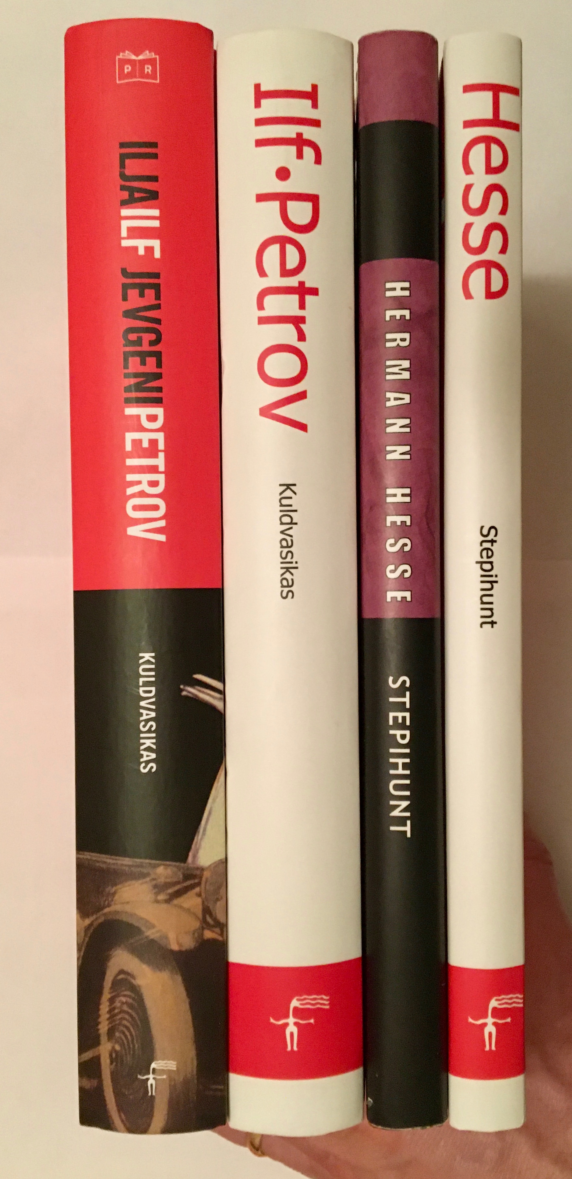 Sarja 4 raamatu seljad